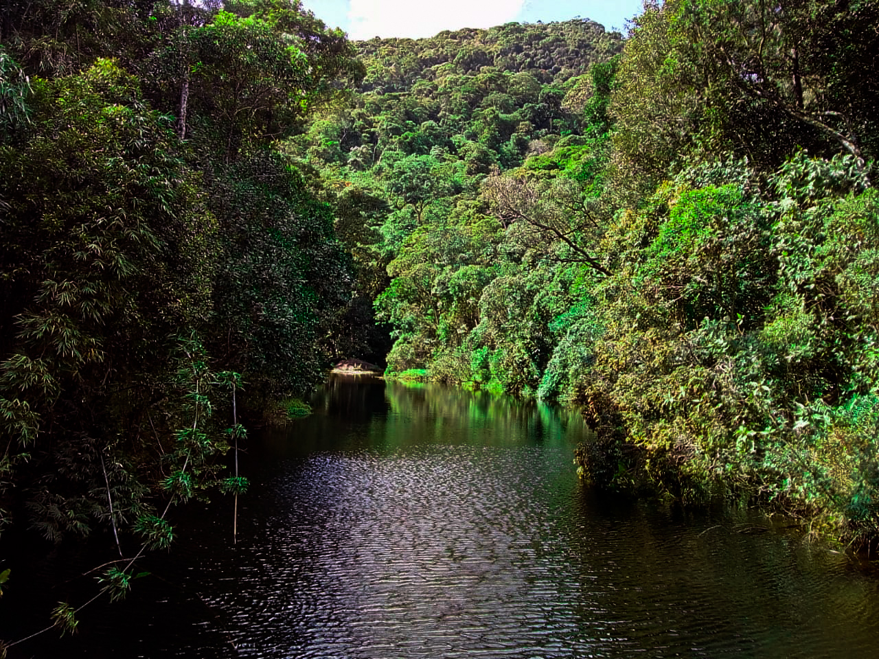 Parque Nacional da Serra dos Orgãos de nível Federal, localizado (a) em Teresópolis (RJ), Petrópolis (RJ), Magé (RJ), Guapimirim (RJ)